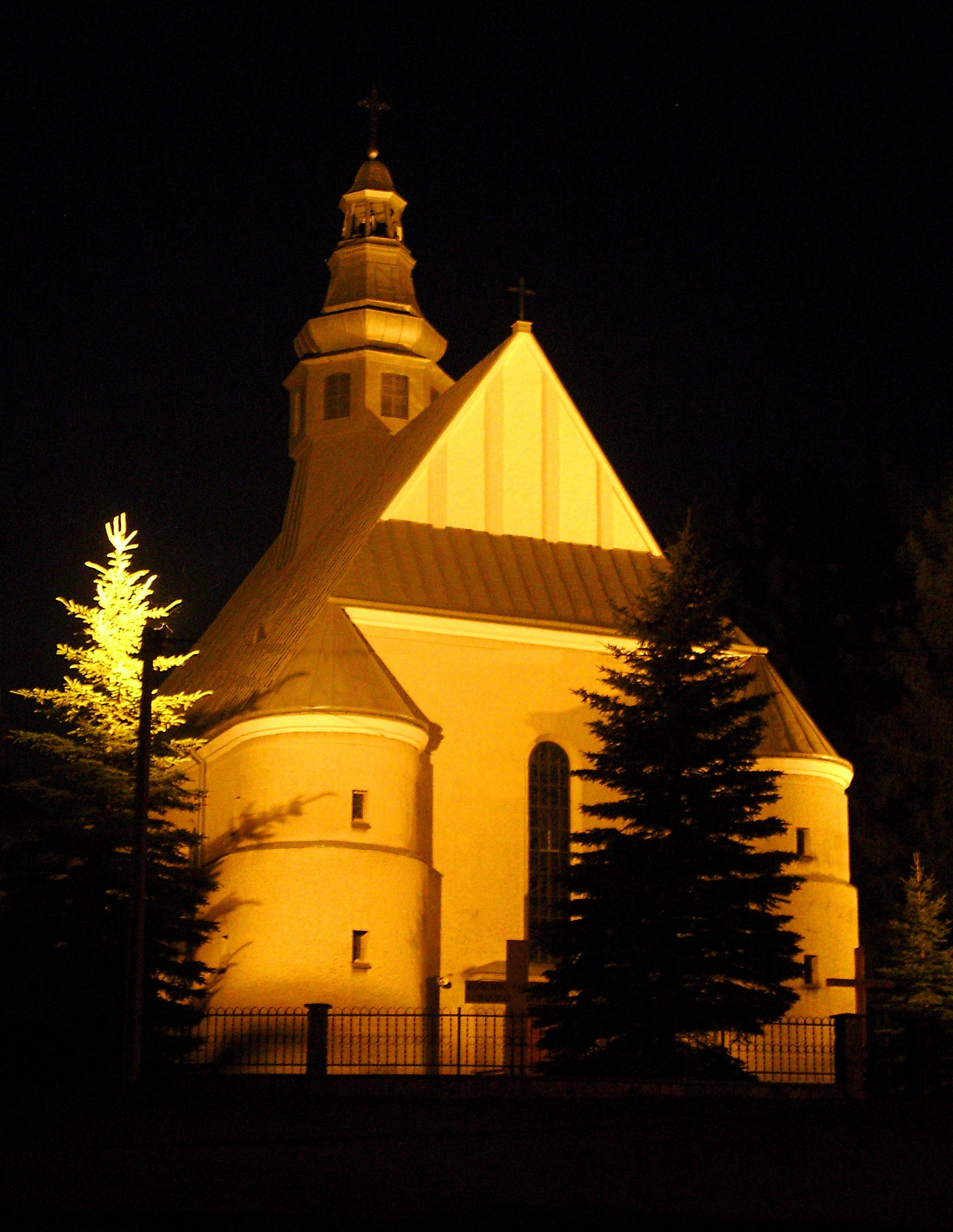 Kościół Imienia Maryi w Bączalu Dolnym w nocnej iluminacji świetlnej (diecezja rzeszowska)